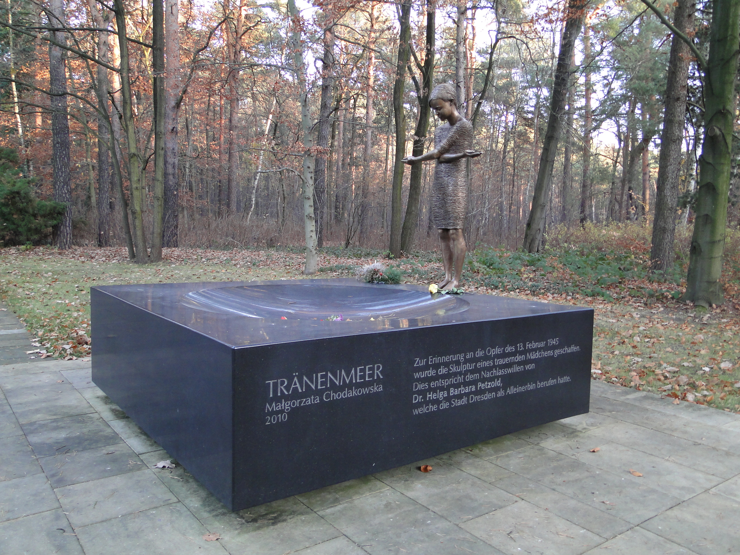 Małgorzata Chodakowska, Skulptur Tränenmeer auf dem Heidefriedhof in Dresden